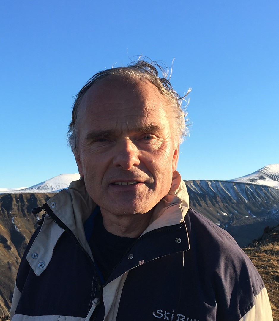 Arild Moe. Foto tatt på Svalbard. Foto: Karoline Flåm